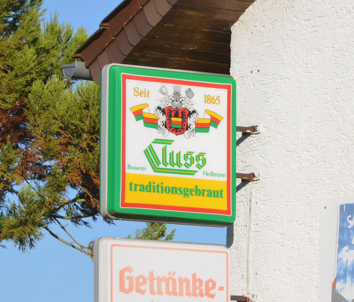 Brauereischild der ehemaligen Heilbronner Brauerei Cluss an einem Getränkemarkt in Obrigheim.